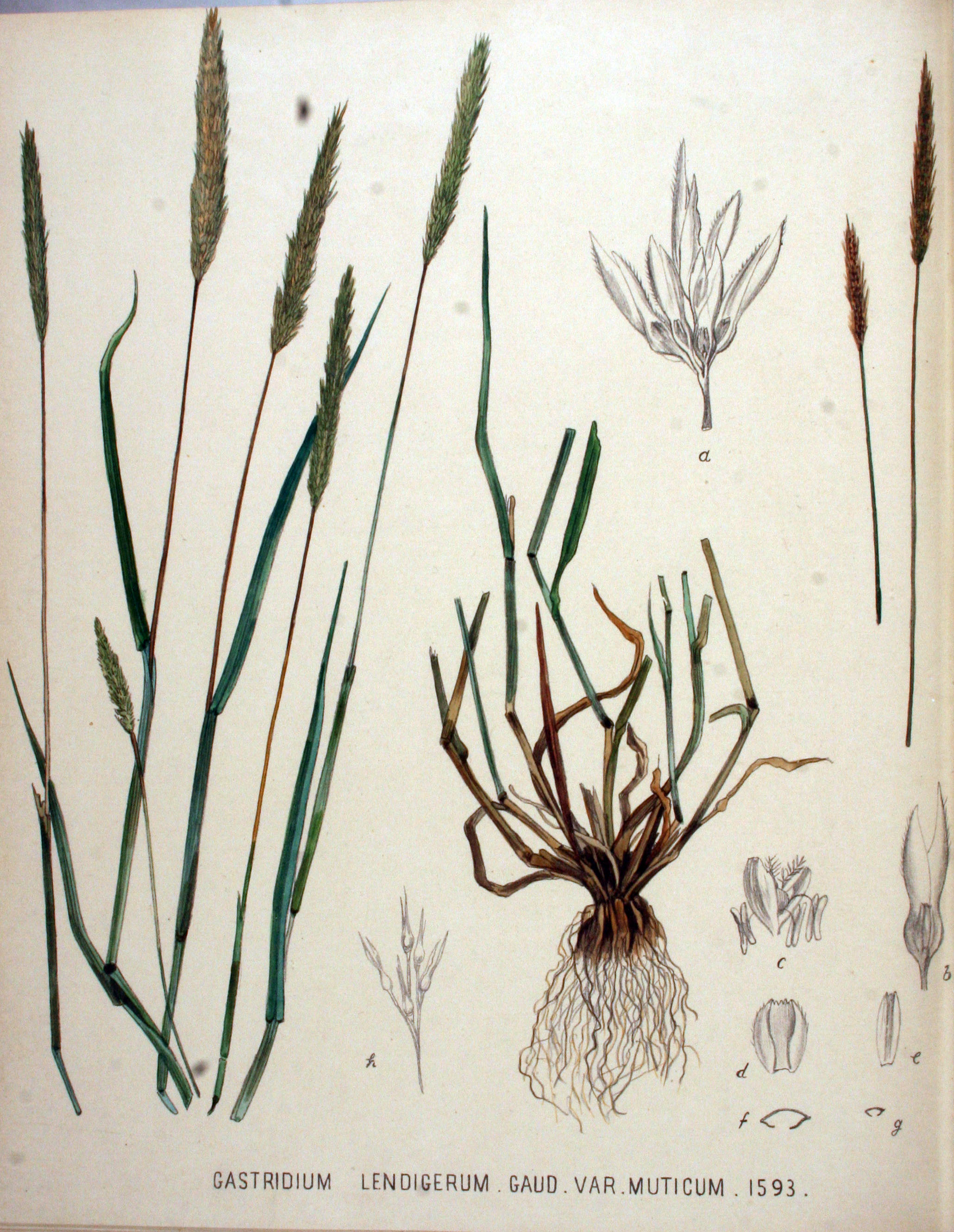 Gastridium ventricosum (Gouan) Schiz & Thell. (Syn. Gastridium lendigerum (L.) Desv.)